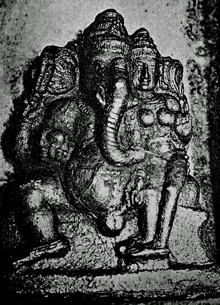 Uchchhishta Ganapati, Nageswaraswamy Temple, Kumbakonam